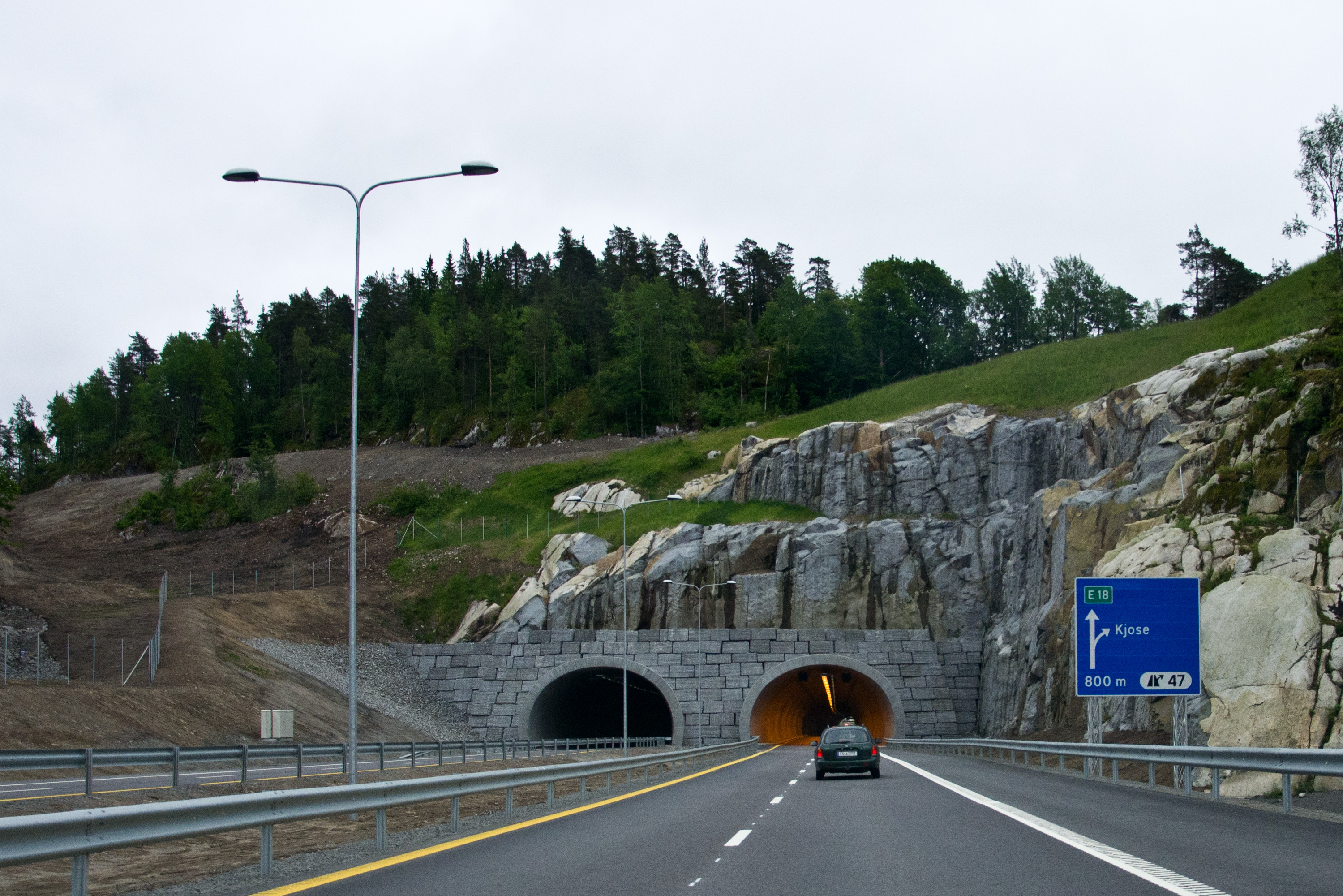 Paulertunnelen E18, Larvik, Vestfold. Sett fra vest